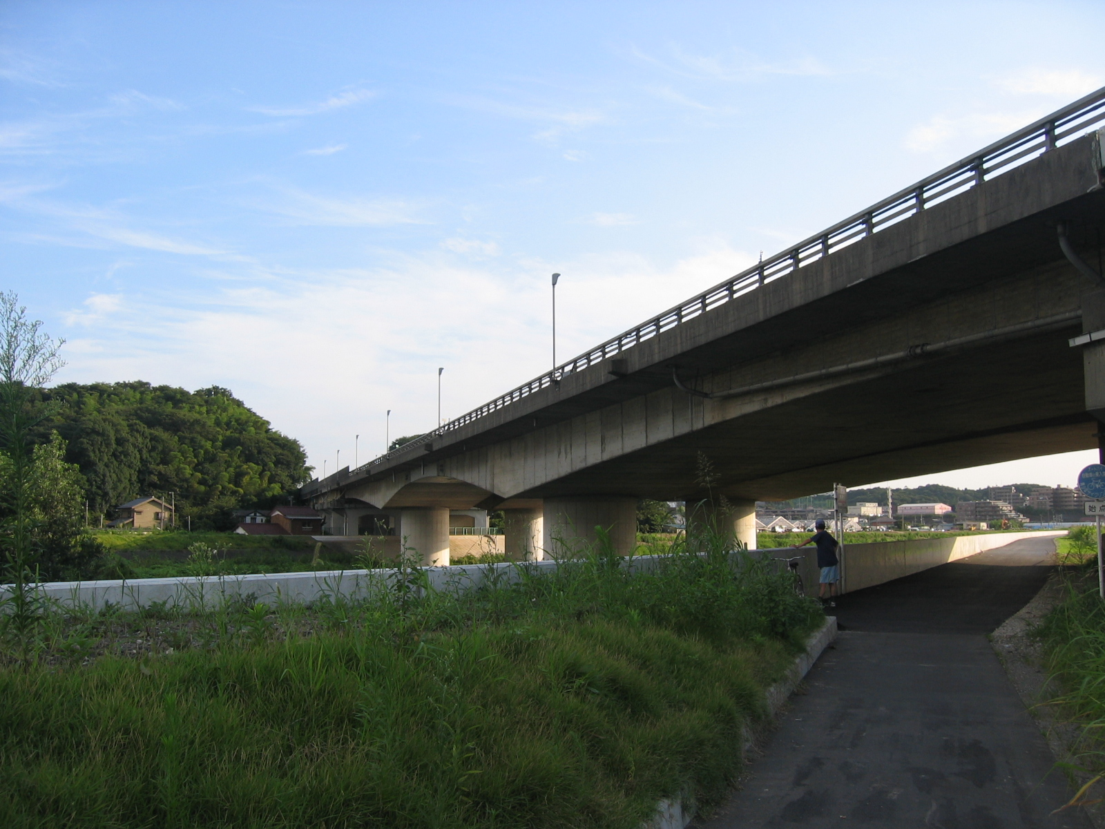 2006年8月21日、利用者自身の撮影。